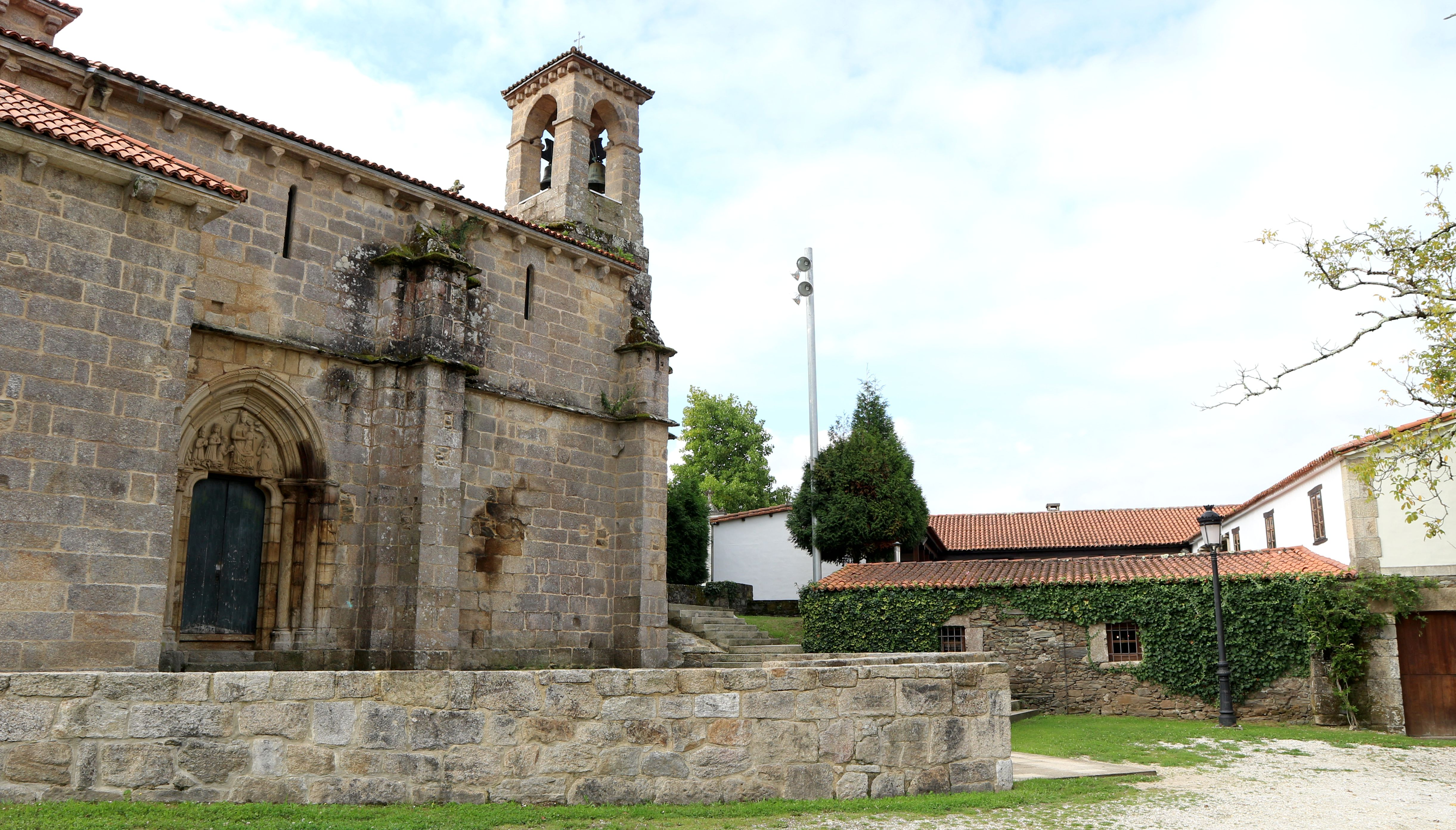 Igrexa e Mosteiro de San Nicolao de Cis, Oza-Cesuras.